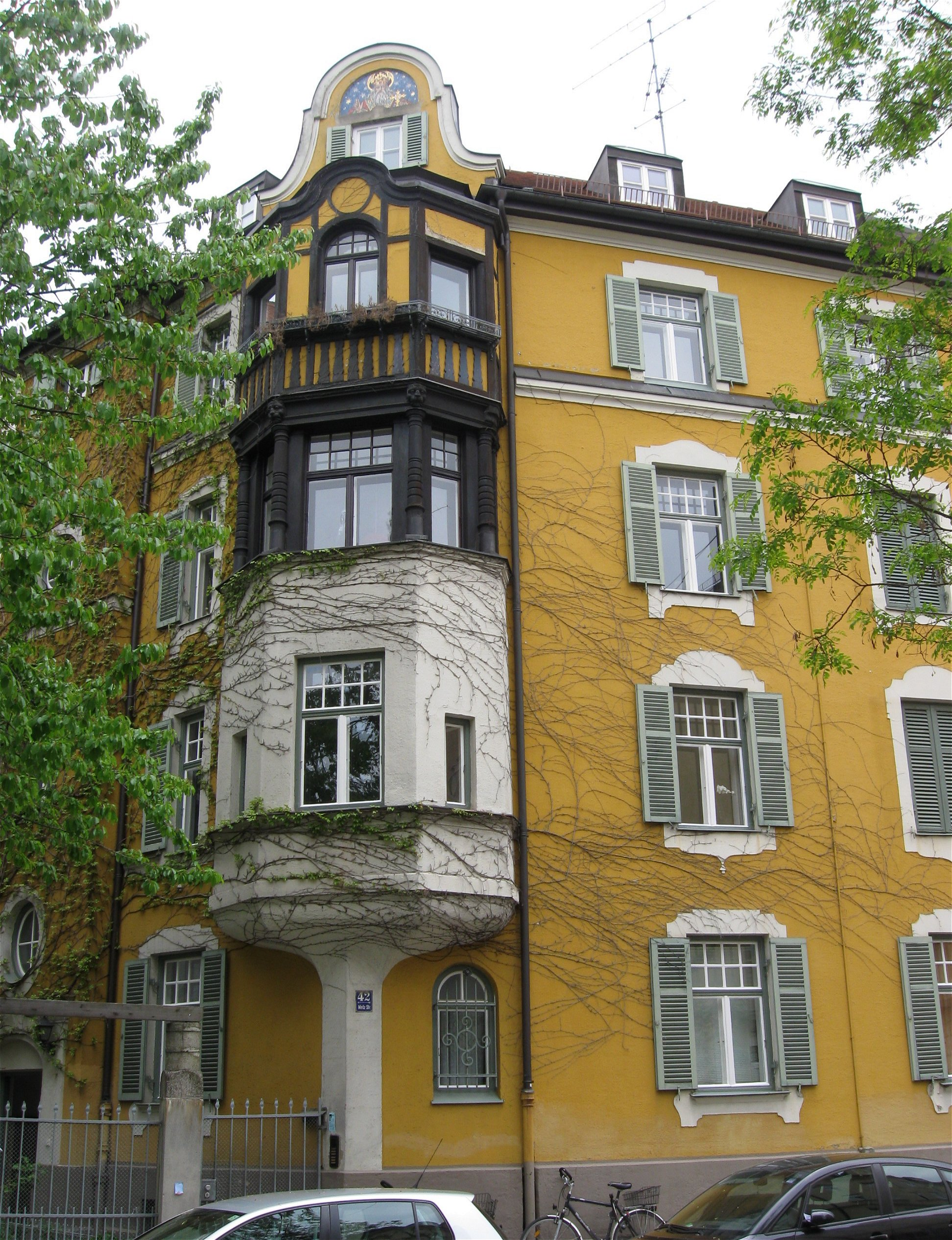 Metzstraße 42. Mietshaus, viergeschossiger barockisierender Eckbau mit Schweifgiebel und Fachwerk am Eckerker, um 1900; mit Einfriedung, Marienmedaillon am Mauerzug, um 1900.